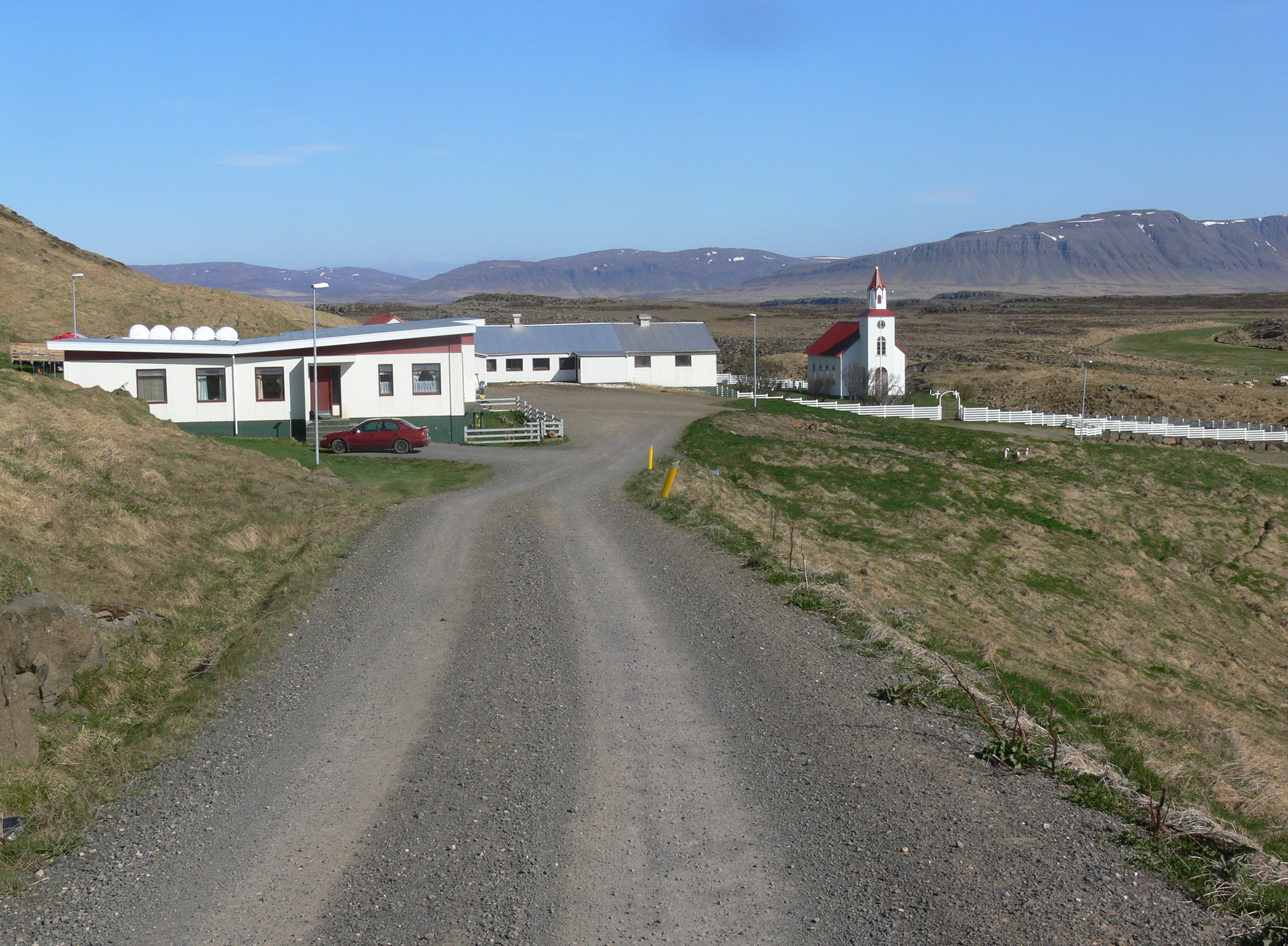 Helgafell bei Stykkishólmur. Hier lebte und starb Guðrún, eine der Hauptpersonen der Laxdæla saga. Sie ist auf dem Friedhof der Kirche begraben.